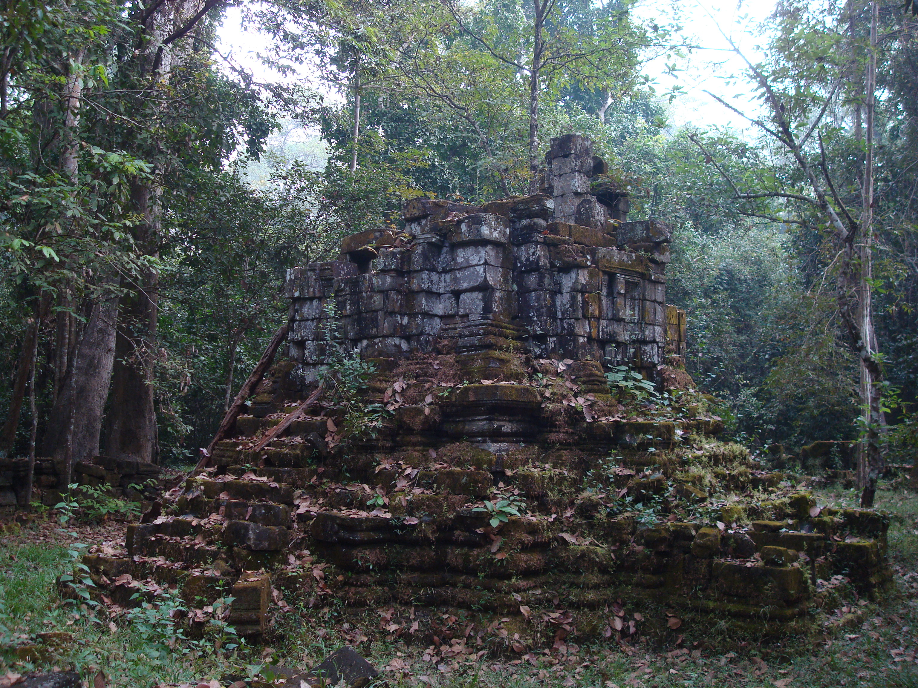 Mangalartha